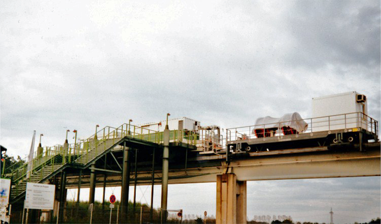 Einer der Werkstattwagen der Transrapidteststrecke in Lathen